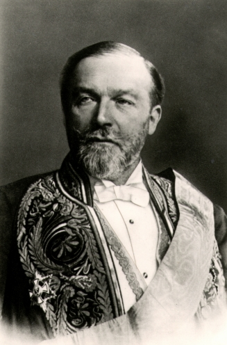 Portrait de Philipp zu Eulenburg-Hertefeld.